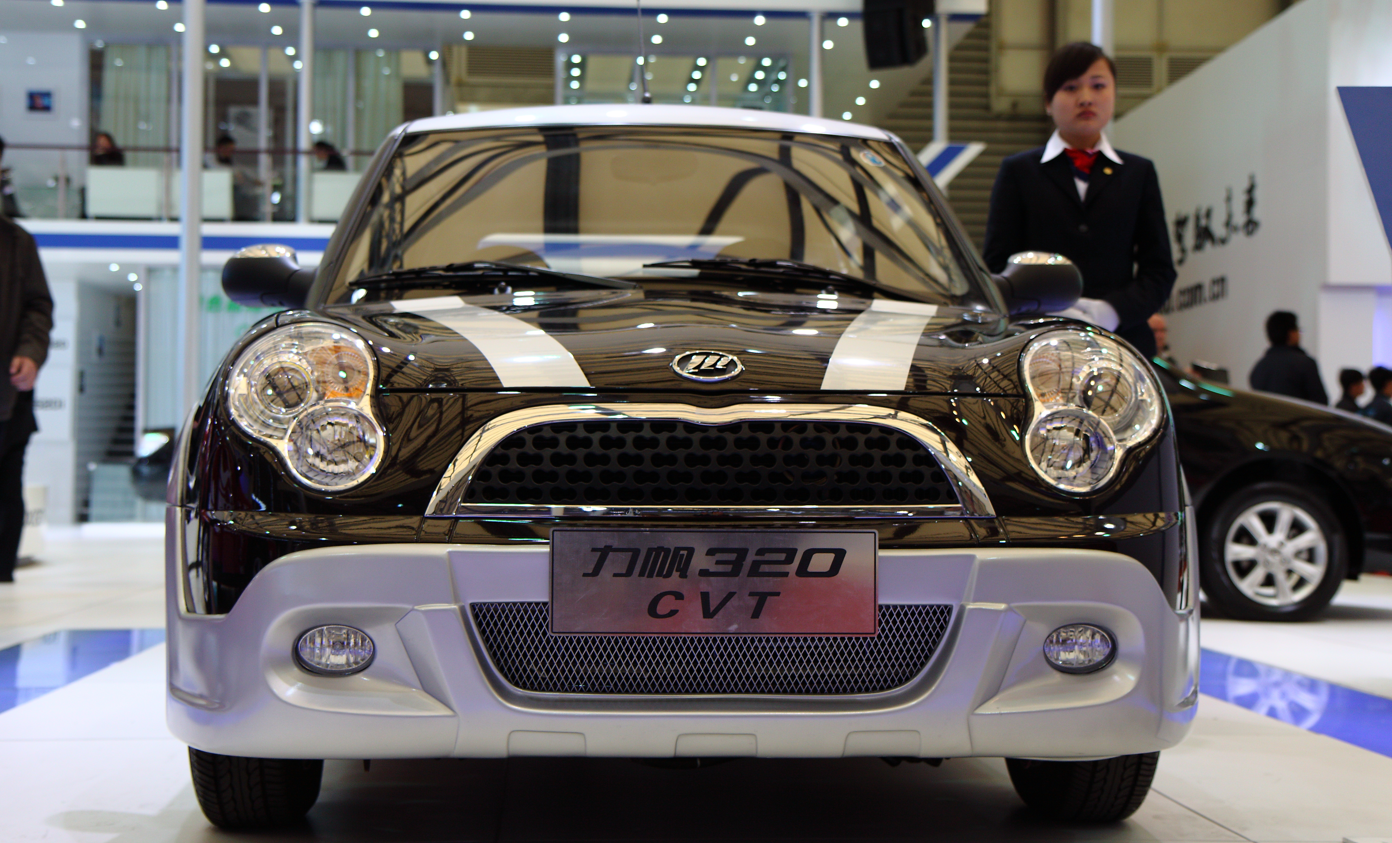 DPP_0772